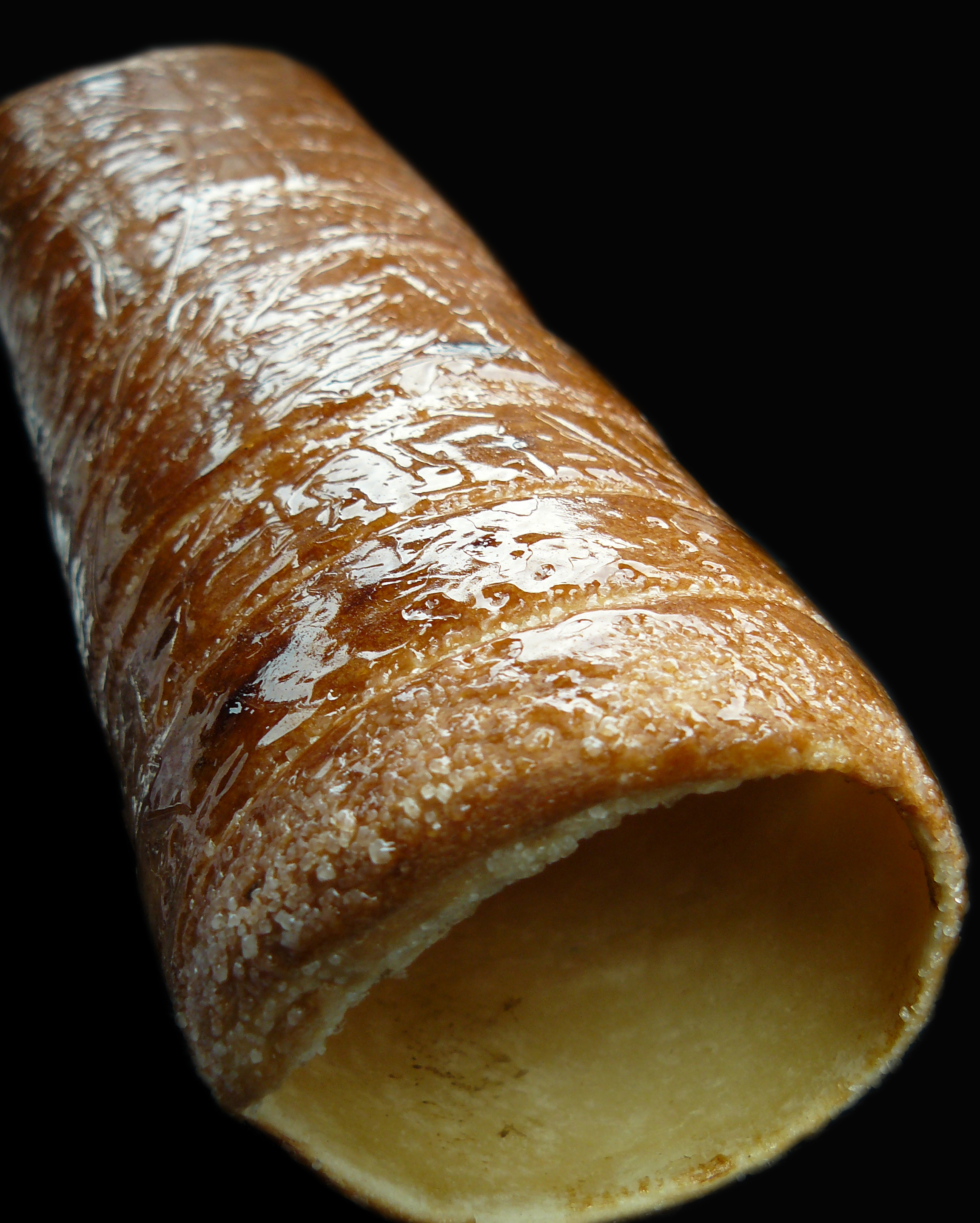 gâteau à la broche Kürtőskalács, spécialité culinaire de la Transylvanie, Roumanie